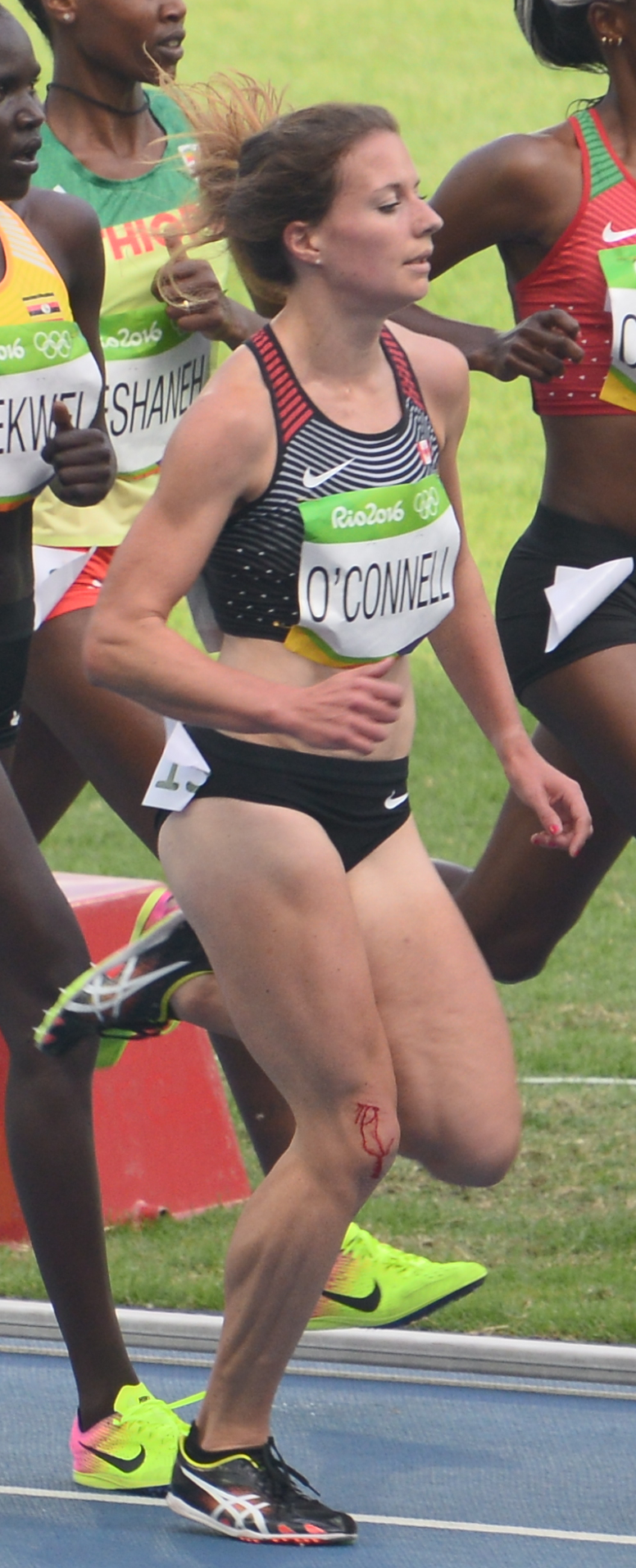 La 1er série du 5000m féminin à Rio 2016